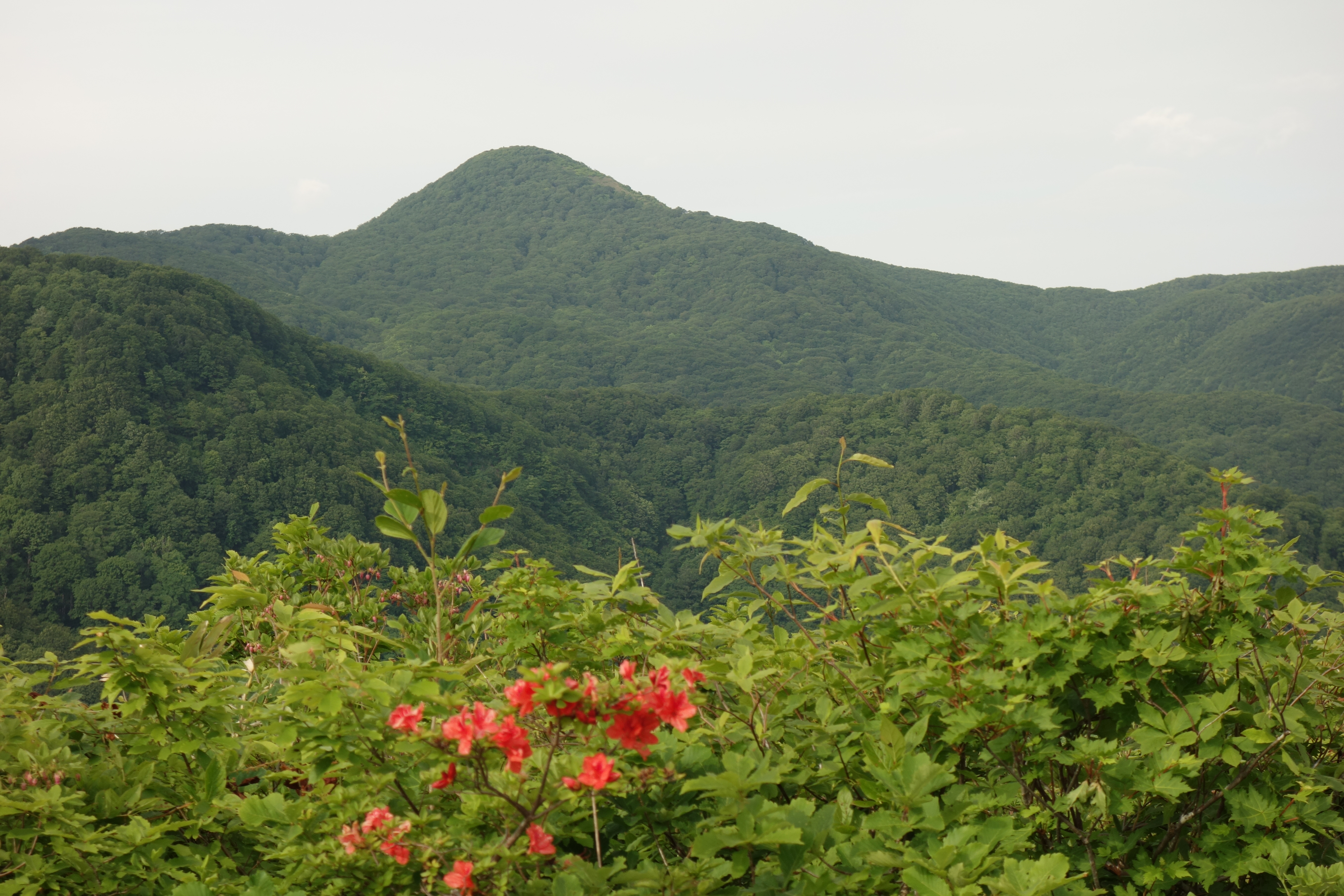 女神山(秋田県，岩手県) 後ろのツル道 熊見平(662m)より臨む